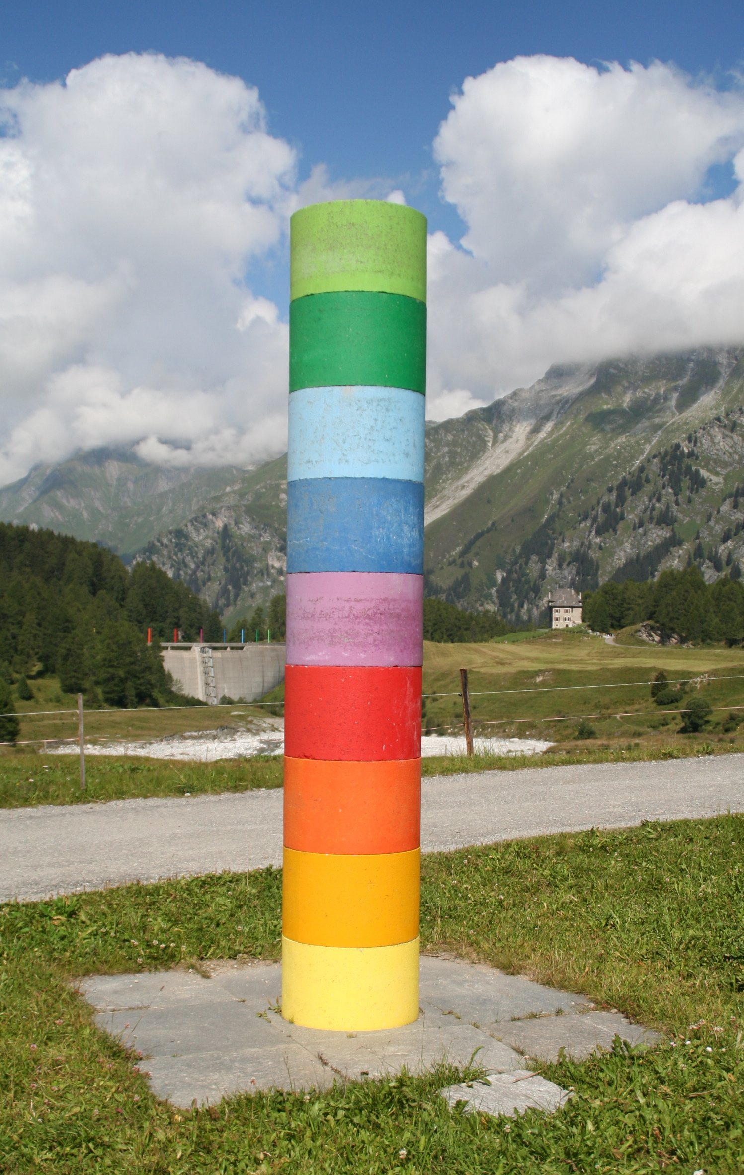 Culurs Von Salecina zur Staumauer